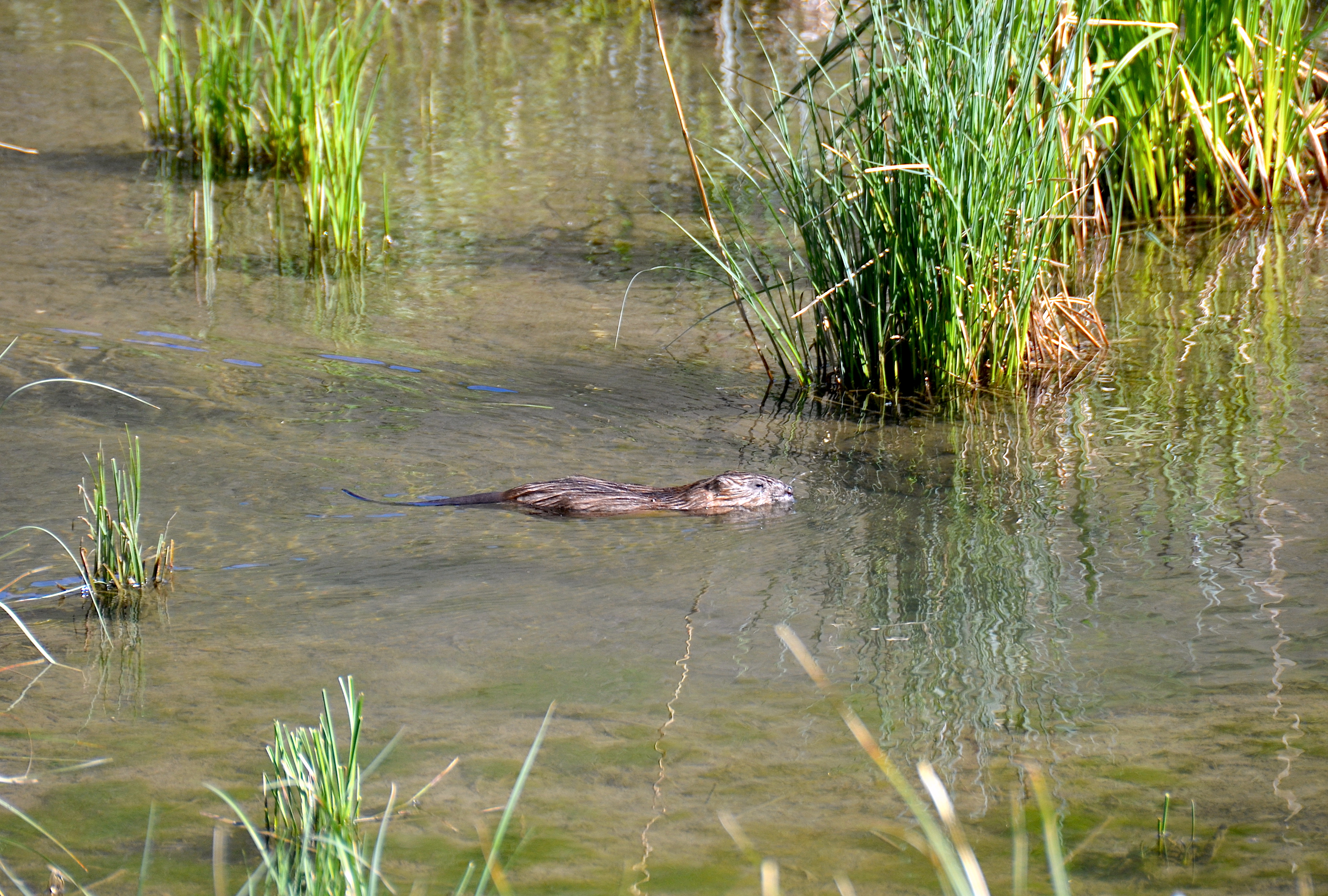 Biber im Biotop Kohlstattbrunnenweiher, Stausee Oberdigisheim